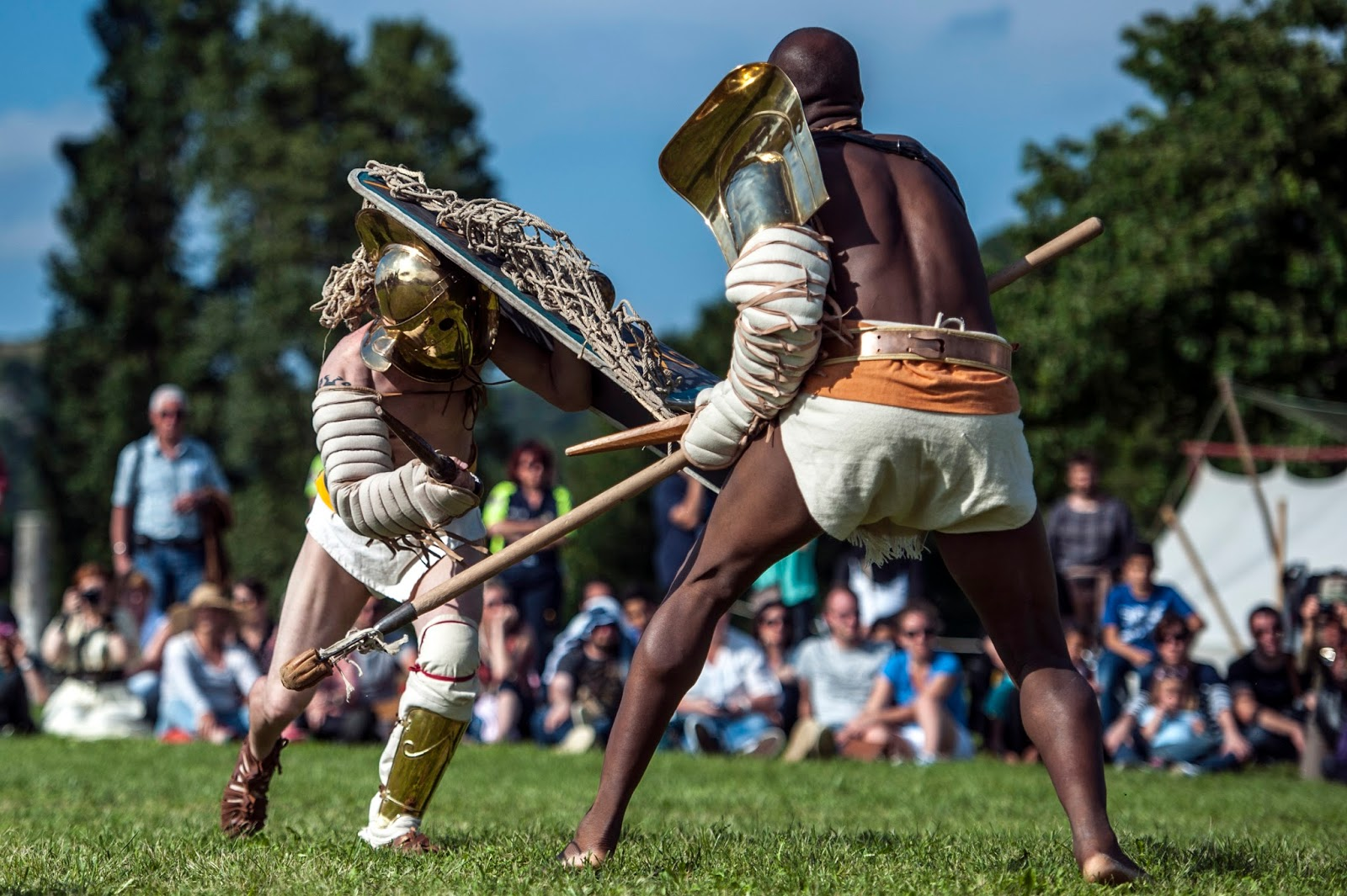 Reconstitution d'un duel secutor contre rétiaire. Troupe Pax Augusta.